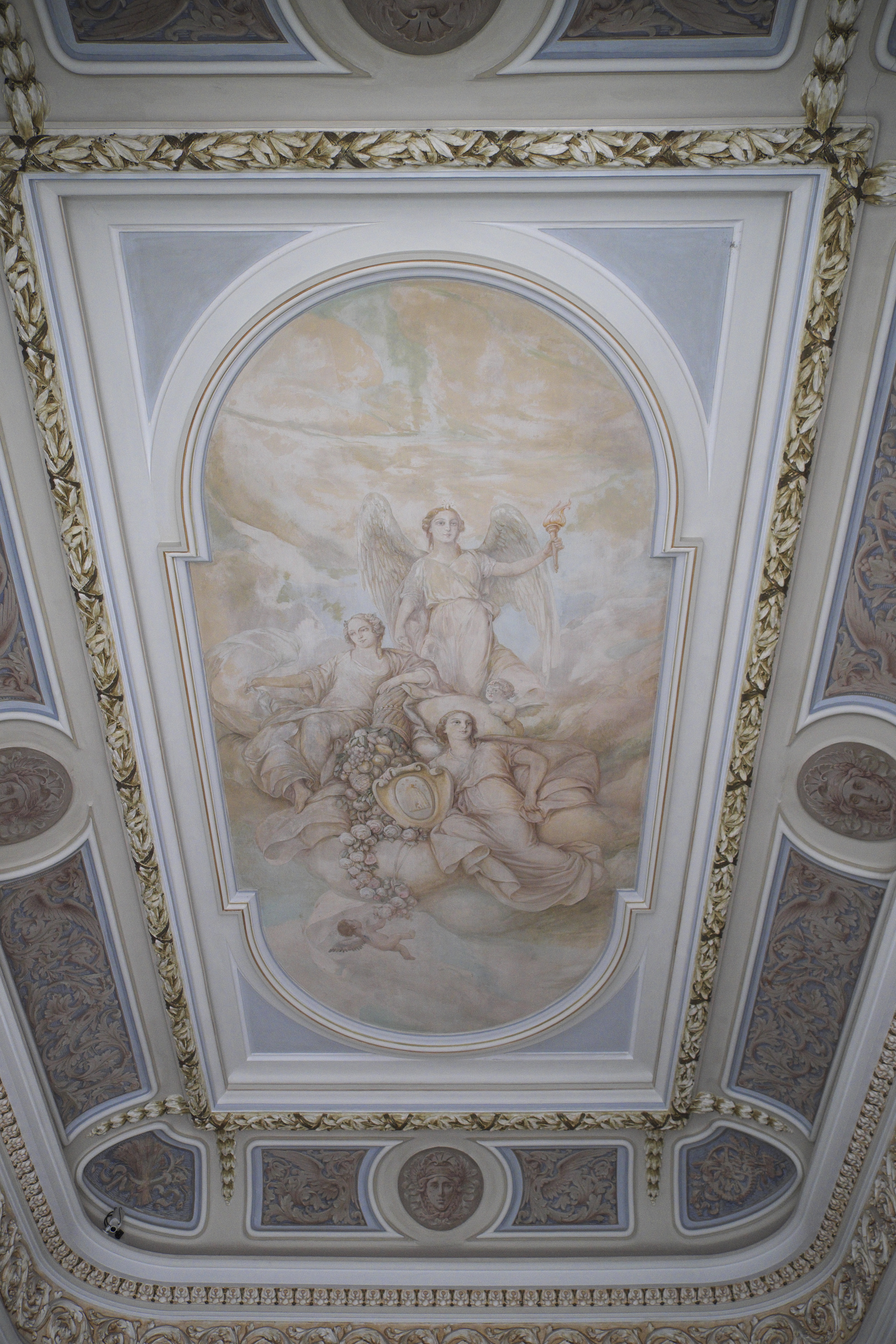 Casa Brunet in Tortosa in der Provinz Tarragona (Katalonien/Spanien), Calle Cervantes 7, Eklektizistisches Gebäude, Sitz der Industrie- und Handelskammer, Deckengemälde im Vorraum